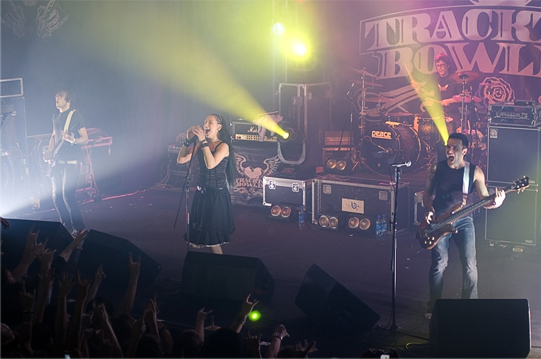 Tracktor Bowling Livekonzert